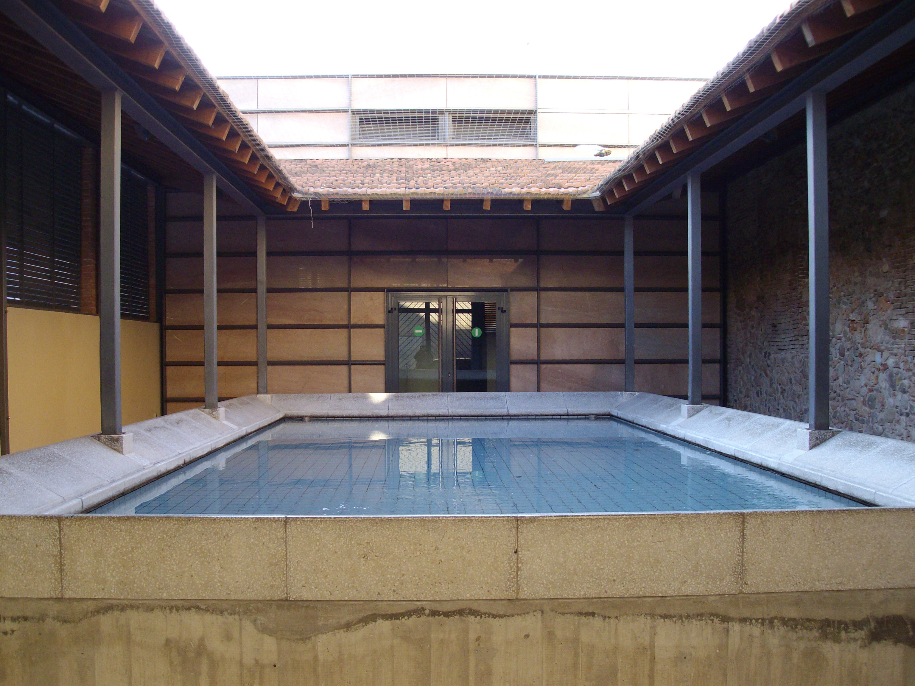 Antiguos lavaderos públicos de la Font Nova. Edificio modernista construido por Miquel Pascual i Tintorer en 1892, situado en la calle de les Paus, 35, de Sabadell, Barcelona (España).